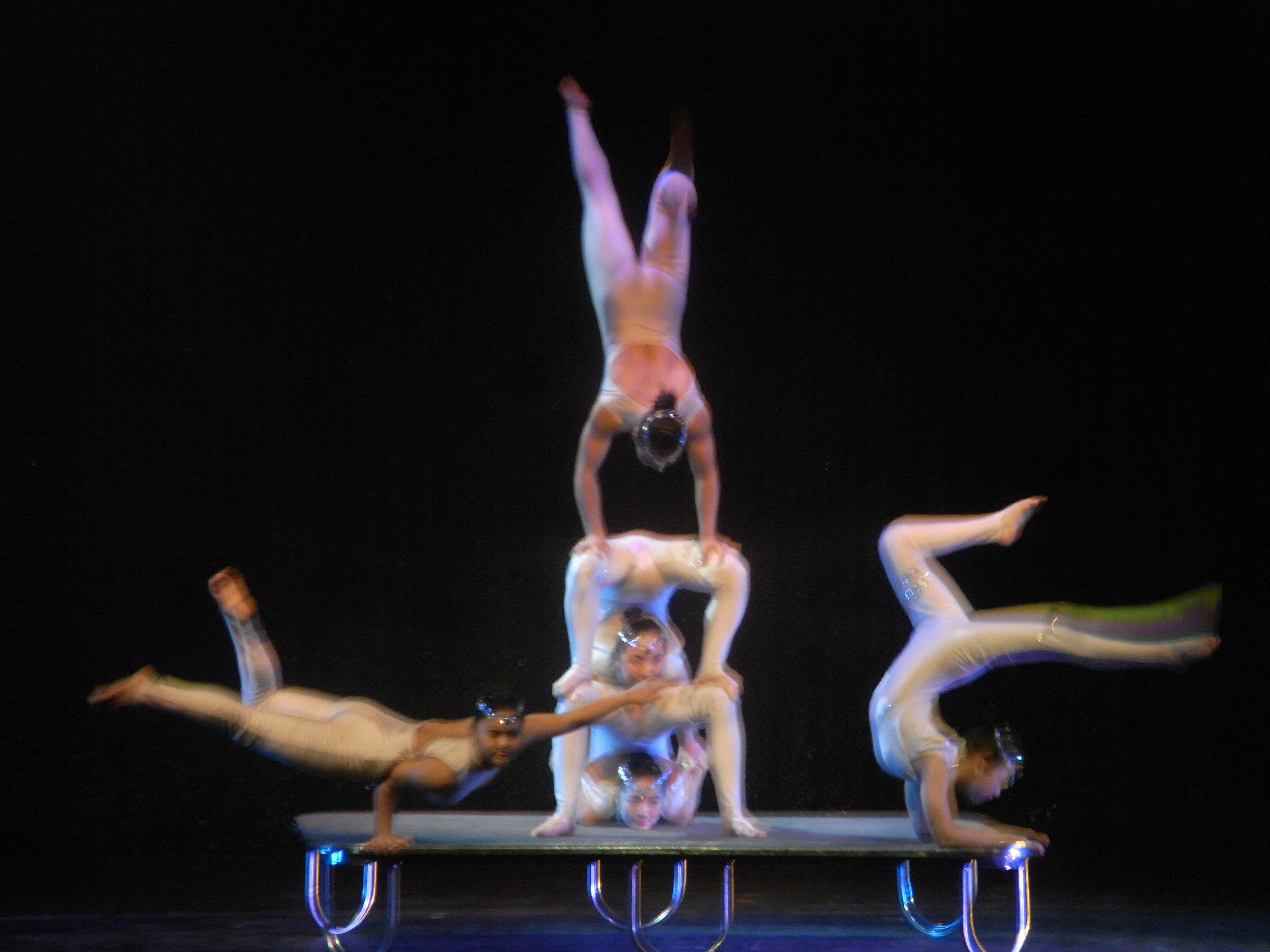 中文（香港）: 上海 白玉蘭劇場 雜技表演藝人